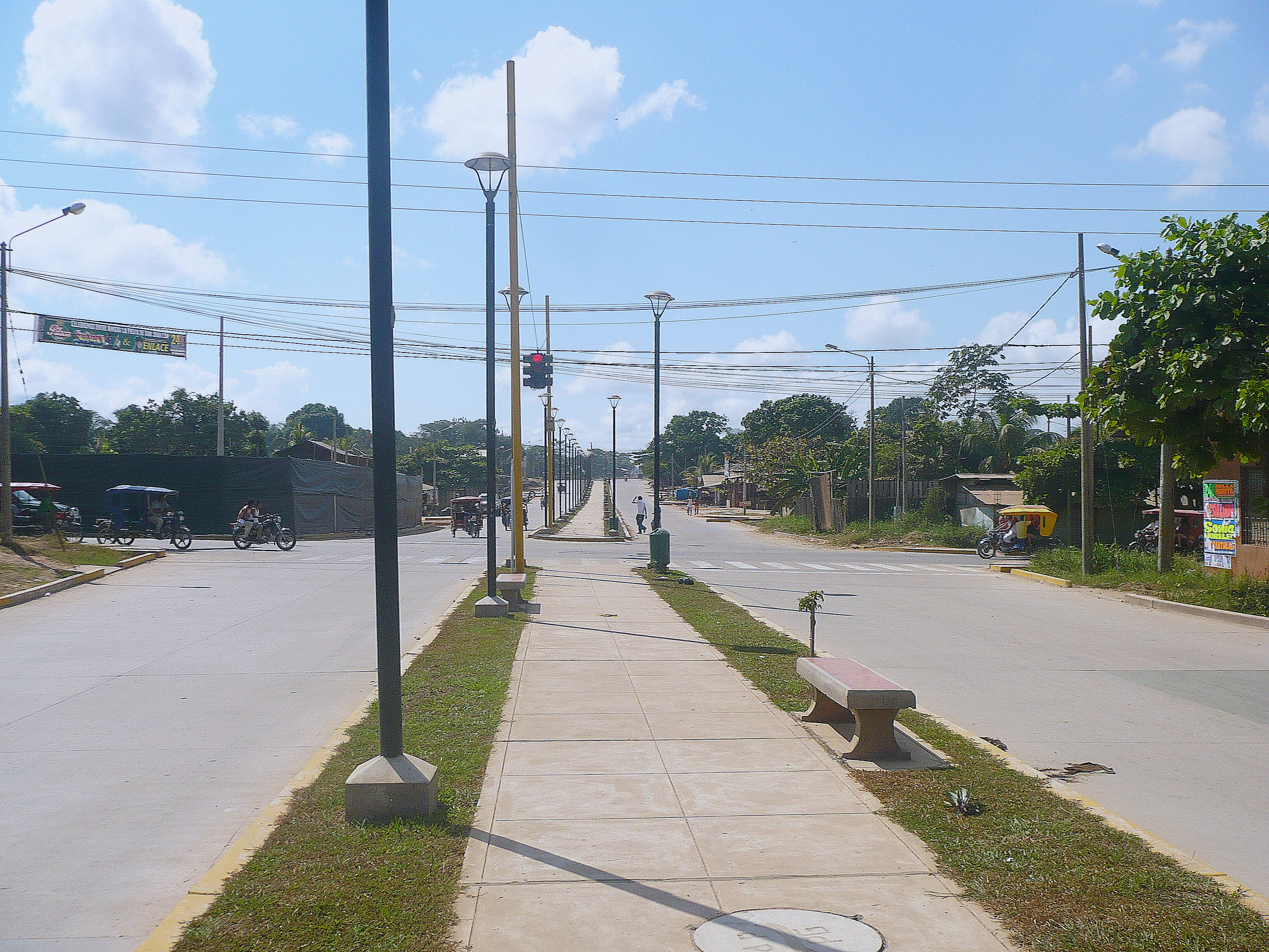 La avenida Amazonas con el jirón Ëgliton en Pucallpa.